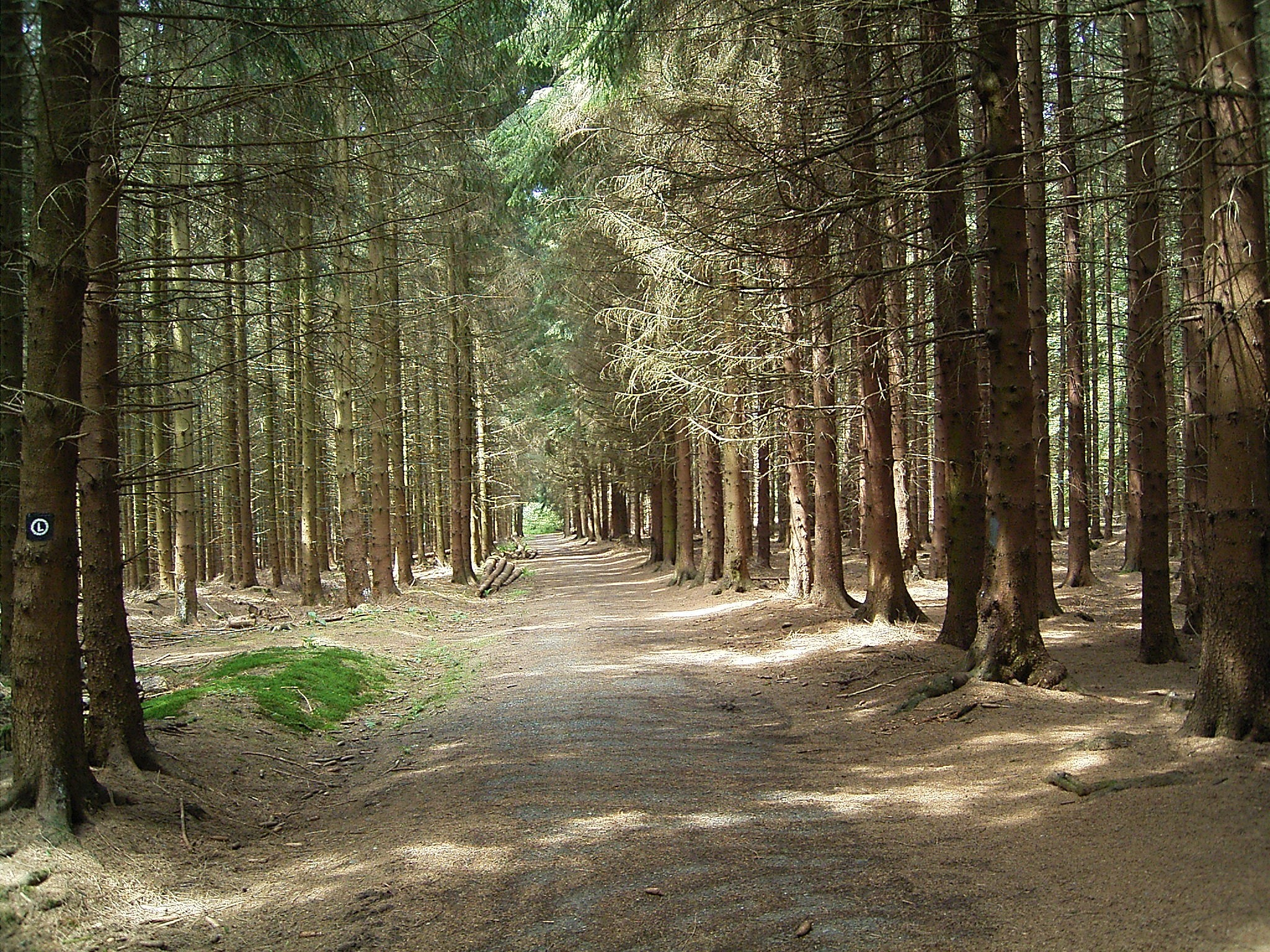 Picea abies